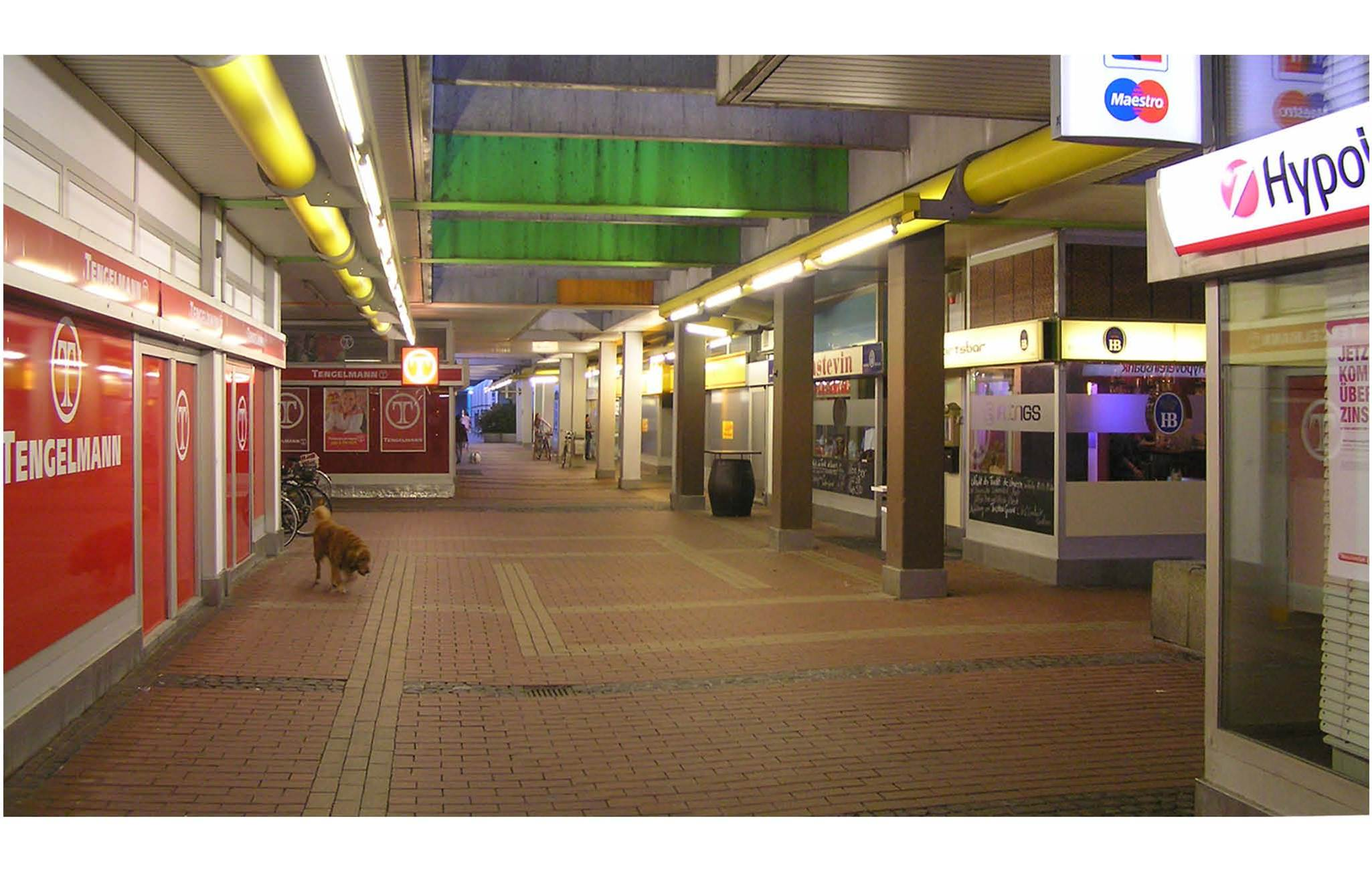 Teil der Ladenstraße im Olympiadorf München (Helene-Mayer-Ring), bevor eine optische Umgestaltung und Verbesserung vorgenommen wurde.